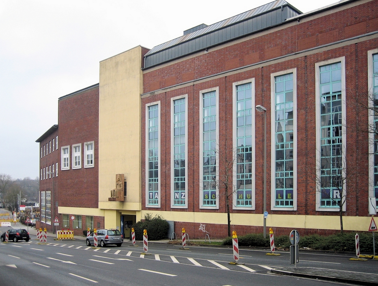 Deutschland, Dortmund, Dortmund-Hörde, das Gebäude der ehemaligen Stiftsbrauerei